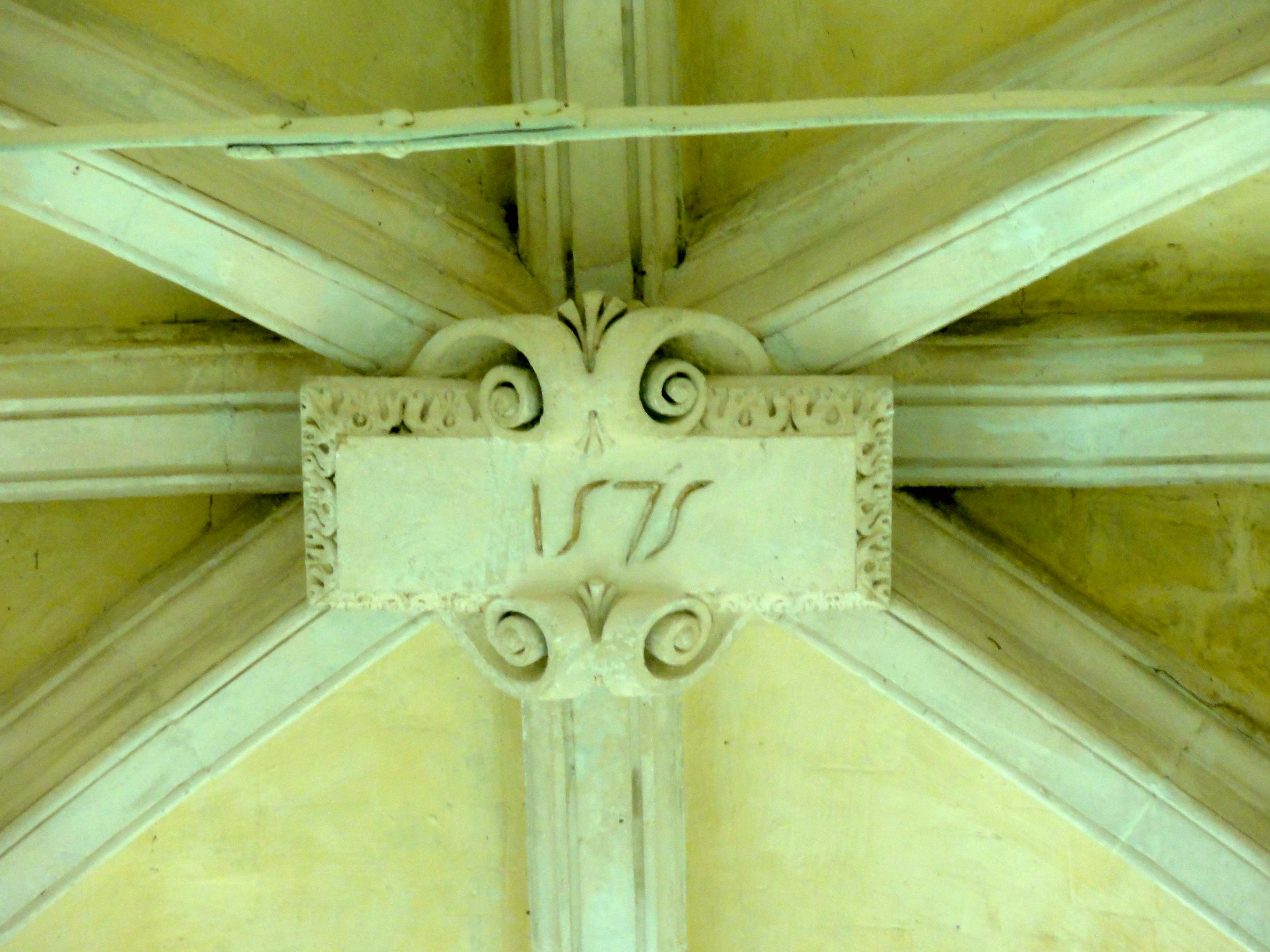 Nef, 5e travée, clé de voûte.